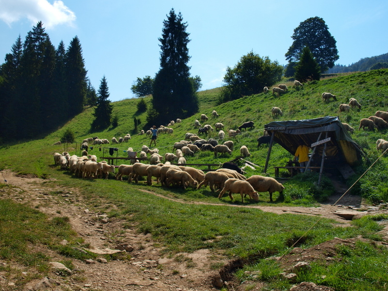 Okolice Bazy Namiotowej pod Wysoką